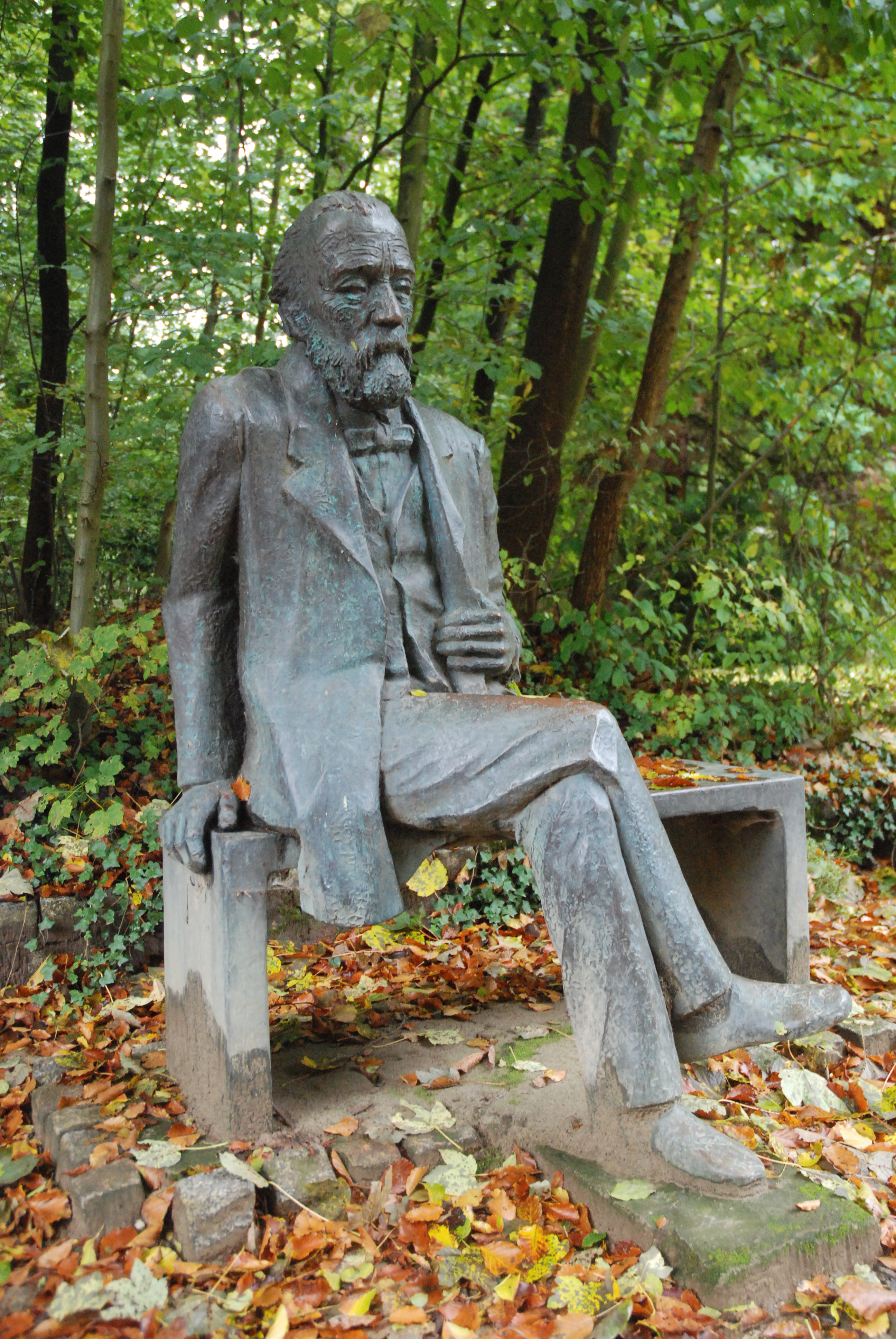 Storm-Statue auf dem "Herrnhuter Gottesacker" (Friedhof)